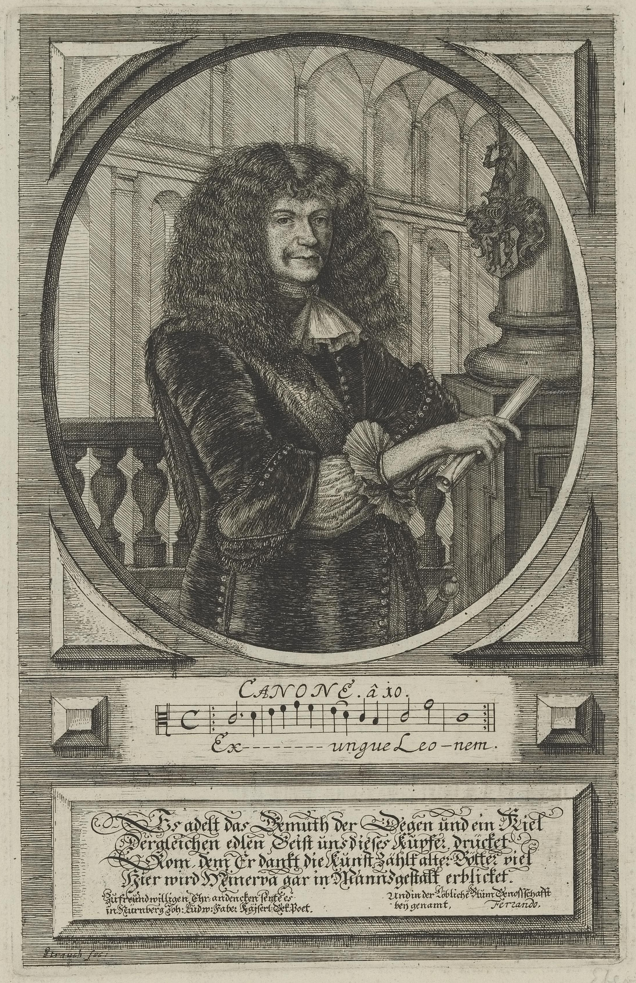 Depicted person: Daniel Eberlin